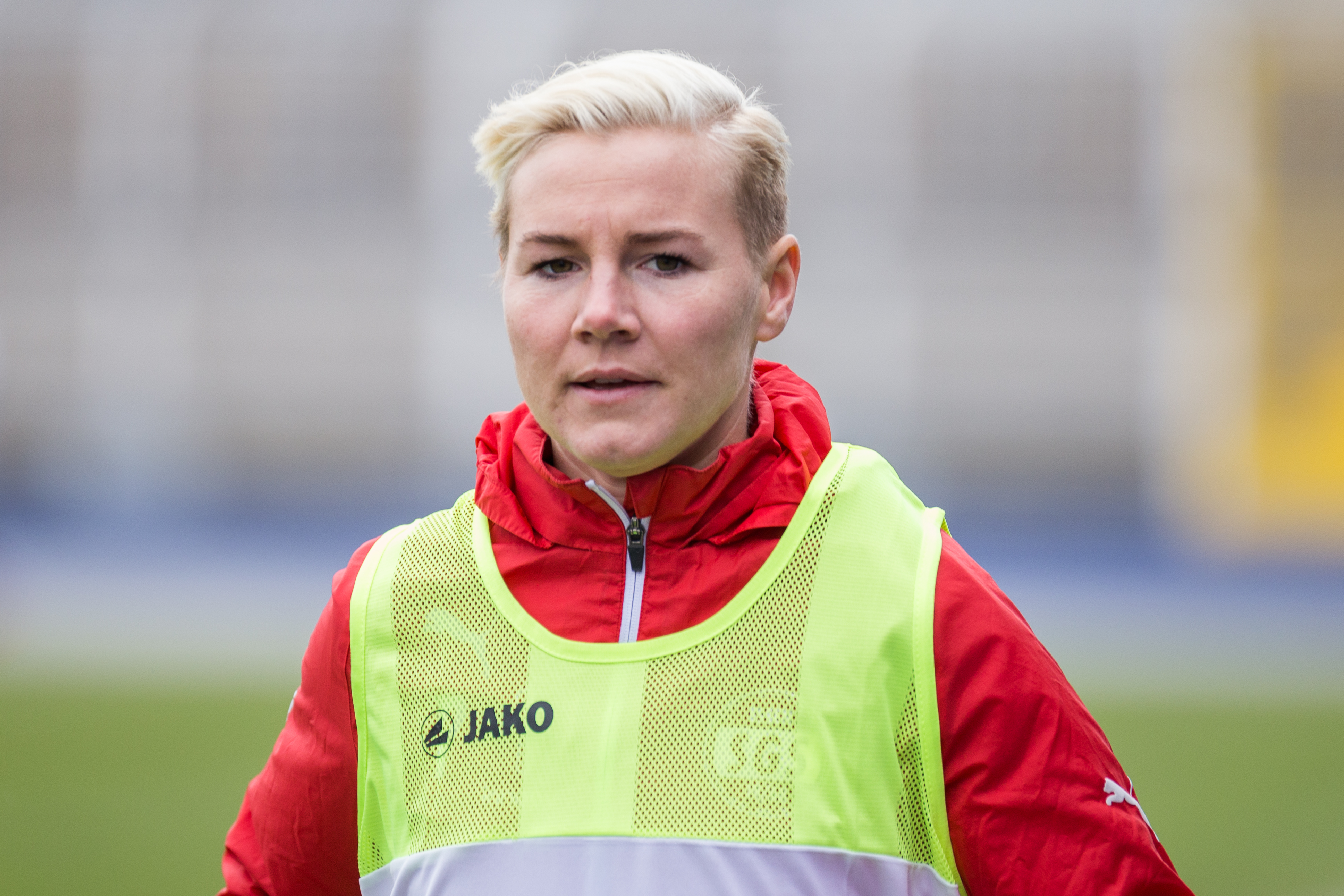 Sarah Freutel (SGS Essen, 7); Porträt, Einzelbild